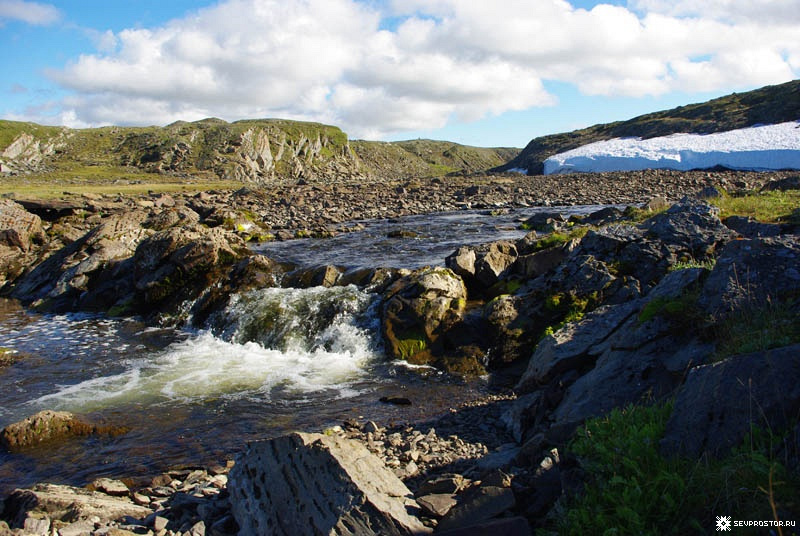 Чудная речка, Югорский полуостров, станция Югорский Шар